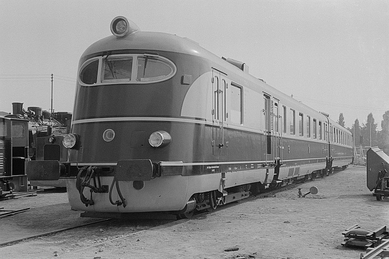 Original image description from the Deutsche Fotothek Triebwagen, im Hintergrund weitere Schienenfahrzeuge auf der Leipziger Herbstmesse 1954